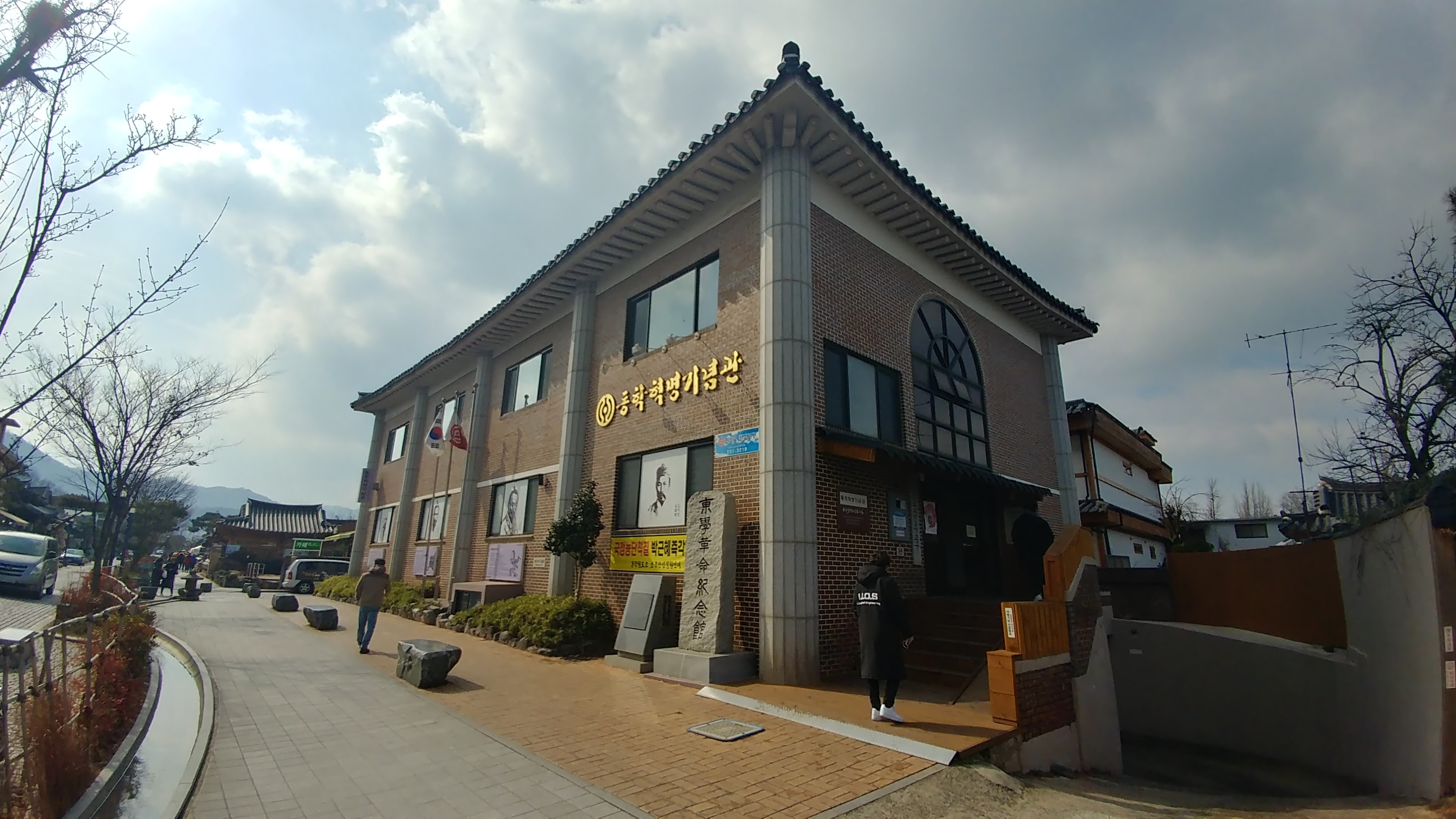 동학혁명기념관